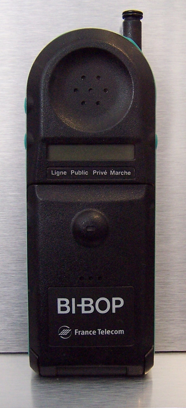 Téléphone Bi-Bop , commercialisé par France Telecom en 1992.